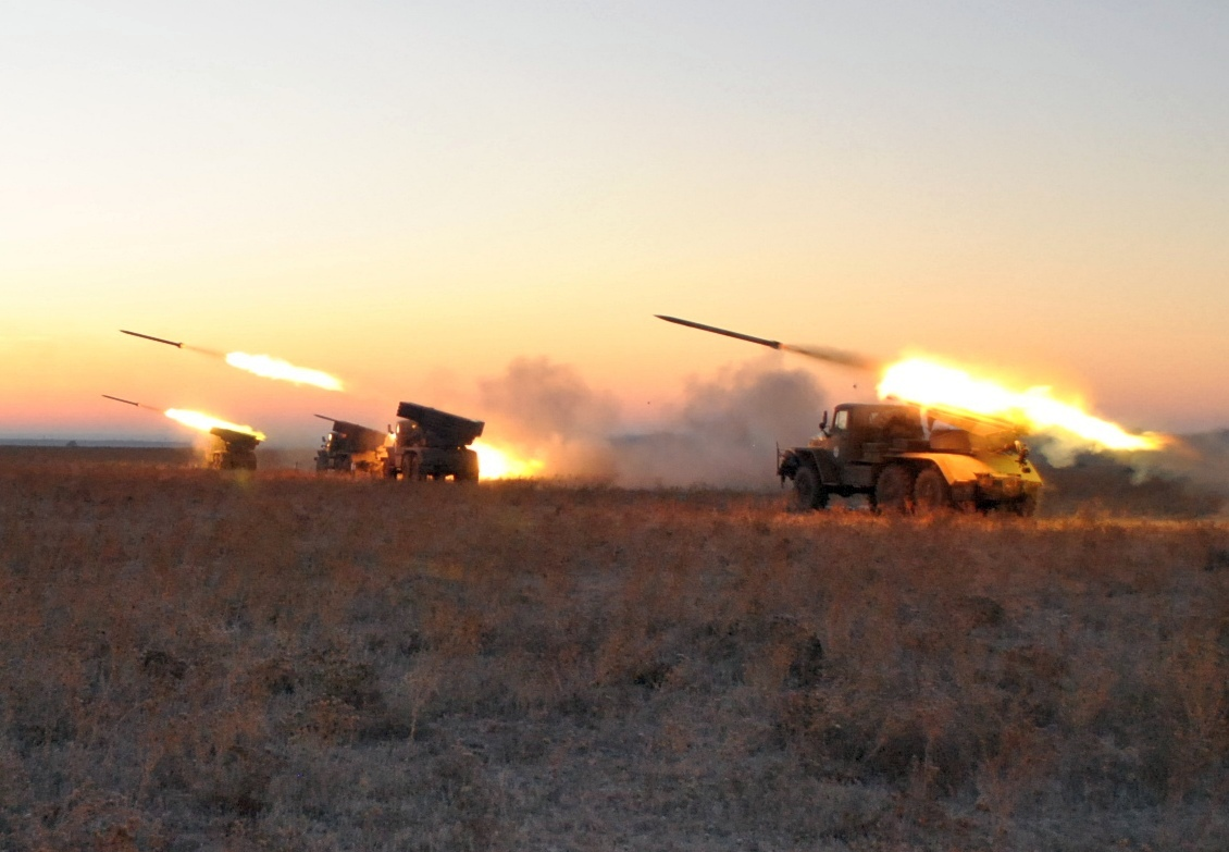 Artillery